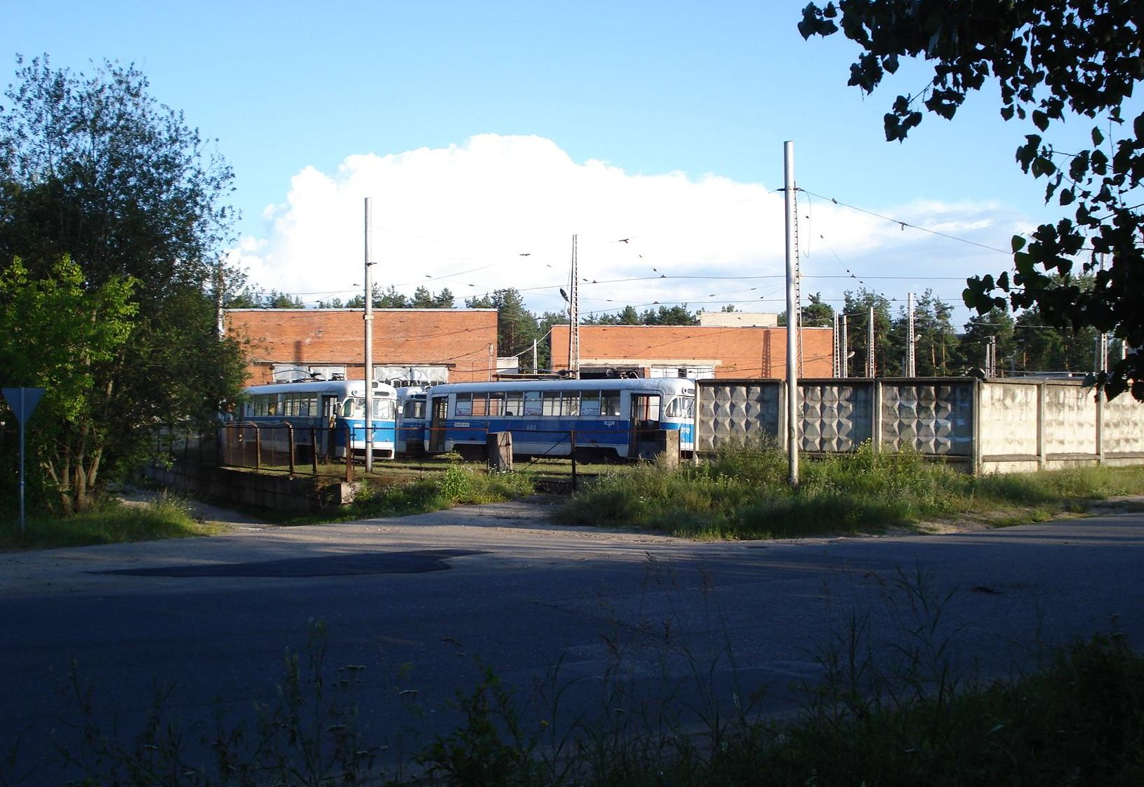 трамвайное депо Даугавпилса по ул. Ятниеку (ранее Ю. Гагарина)